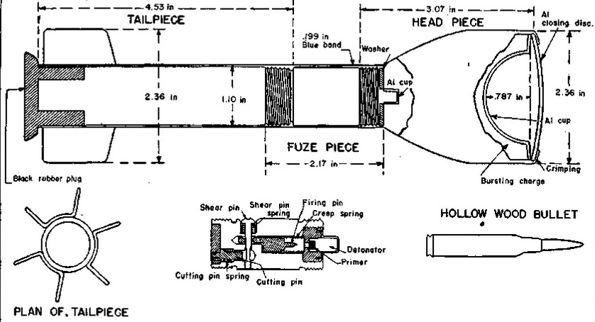 Gewehr granate für panzer 1940